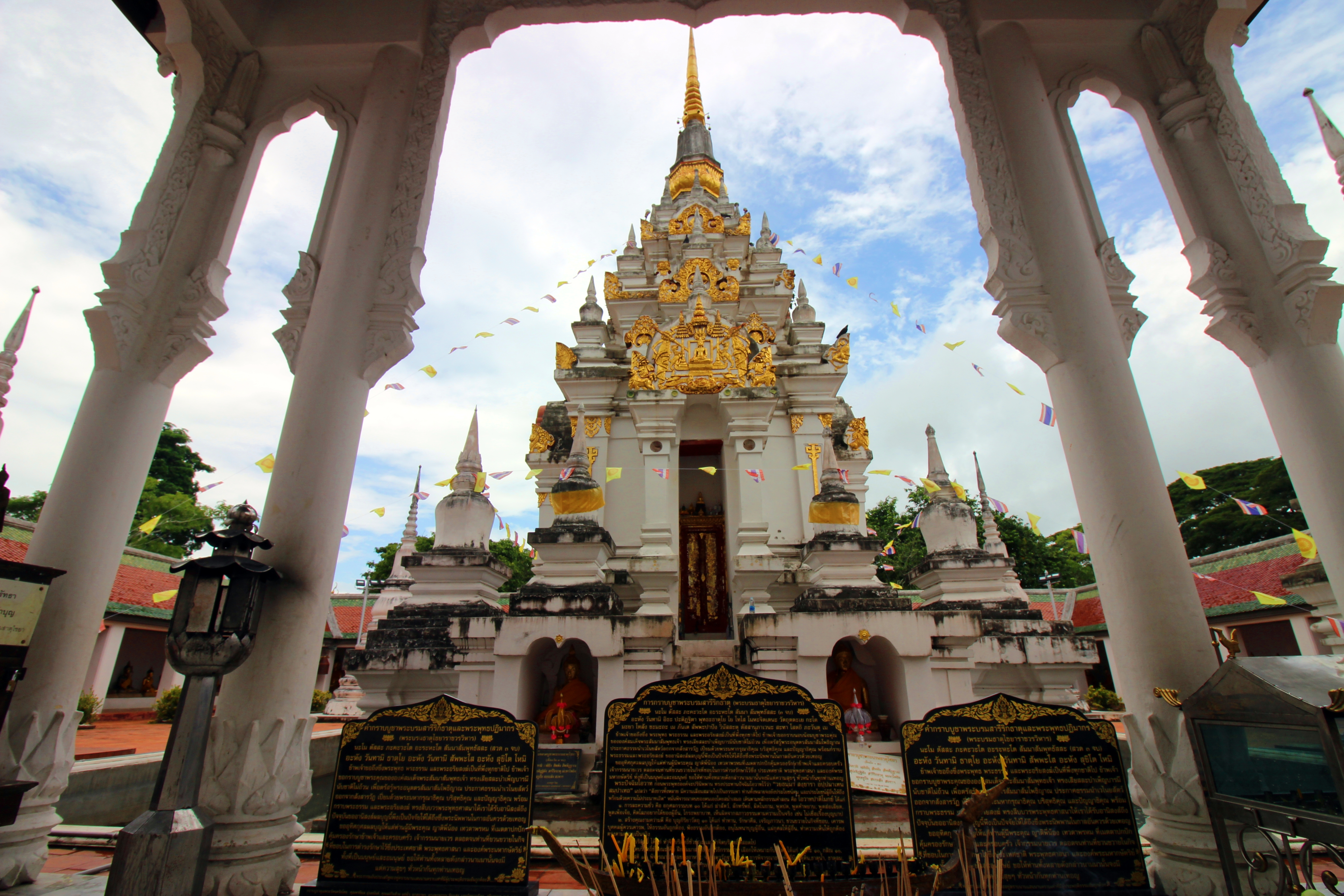 วัดพระบรมธาตุไชยา สุราษฎร์ธานี